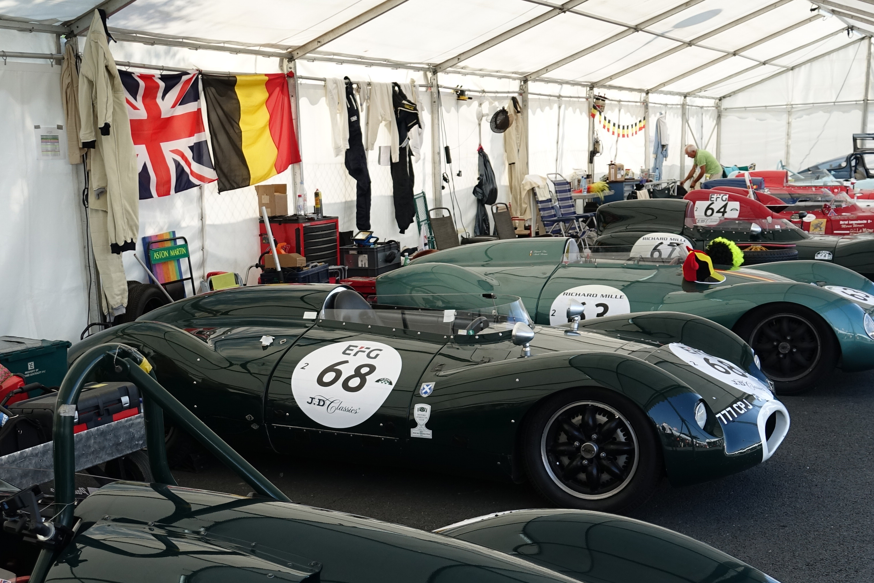 Lotus XV (1968) au Le Mans Classic 2018